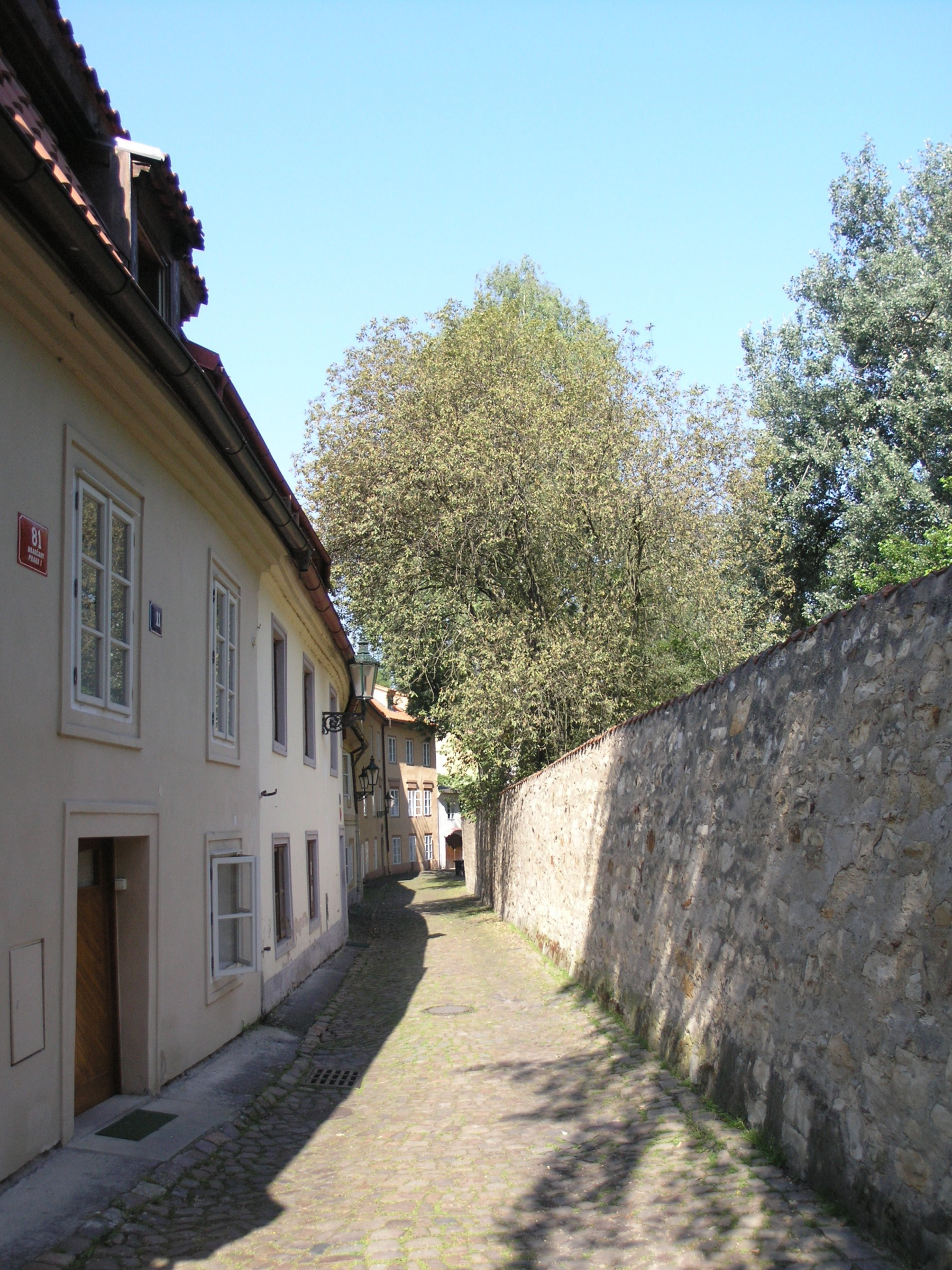 Praha, Hradčany - ulice Nový svět, pohled od křižovatky s Kapucínskou ke křižovatce s Černínskou